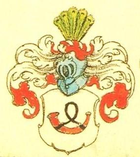 Wappen derer von Falkenhayn (Falckenhan) (Märkische Linie) im Siebmacher von 1605.